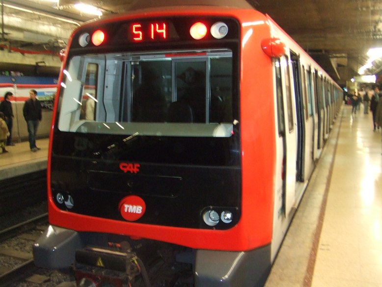 Tren de la serie 5000 de la L5 del metro de Barcelona en Diagonal.